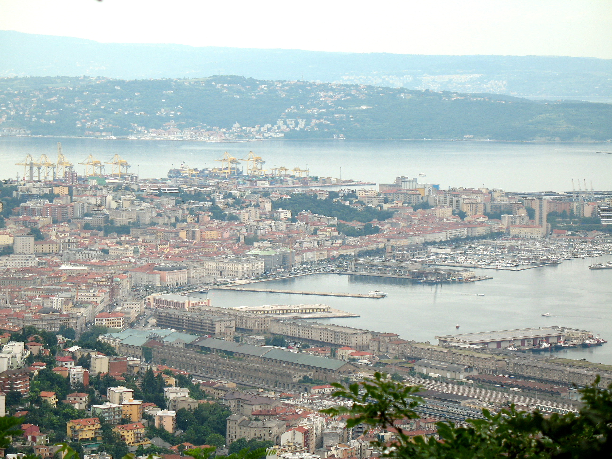 Immagine da Trieste. Panorama dalla fermata Obelisco della trenovia di Opicina